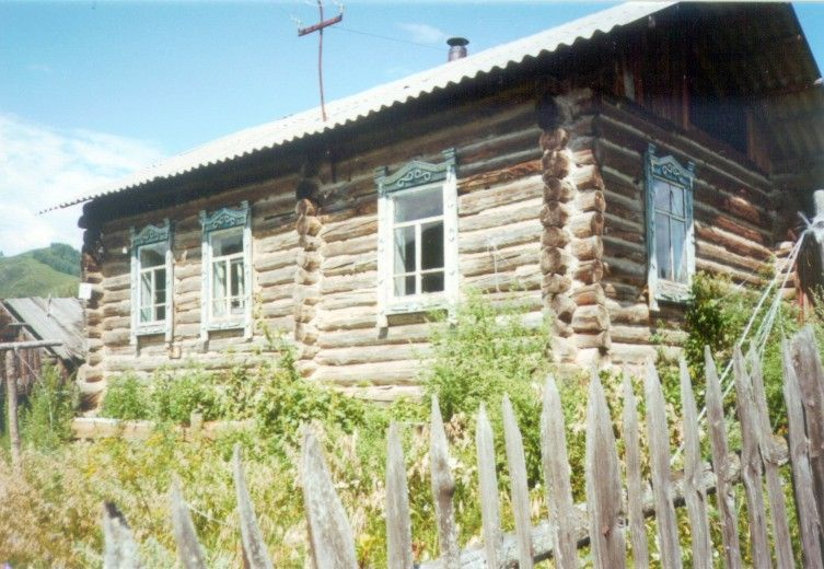 Blockhaus im russischen Altai-Gebirge